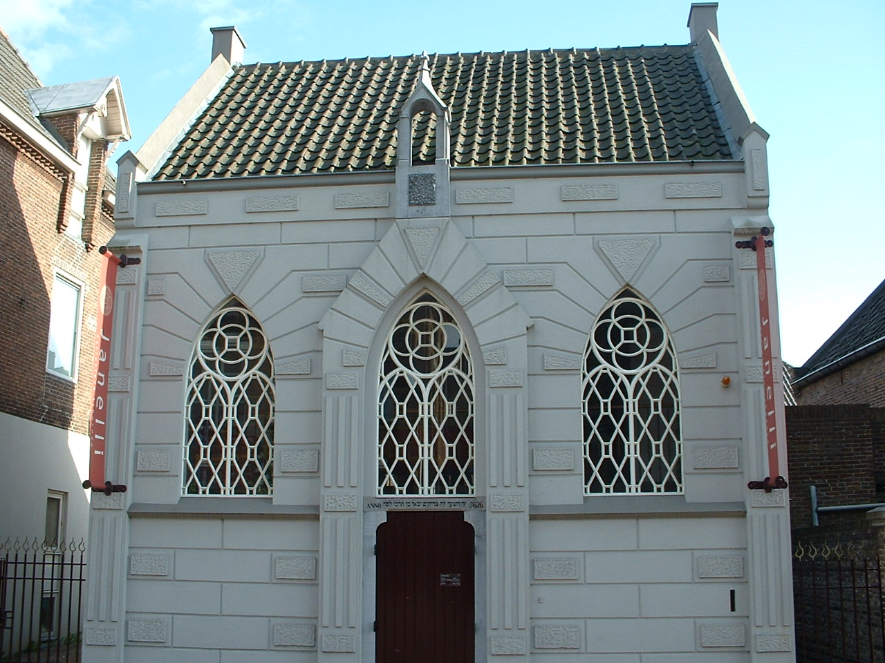 Former Synagogue in Veghel